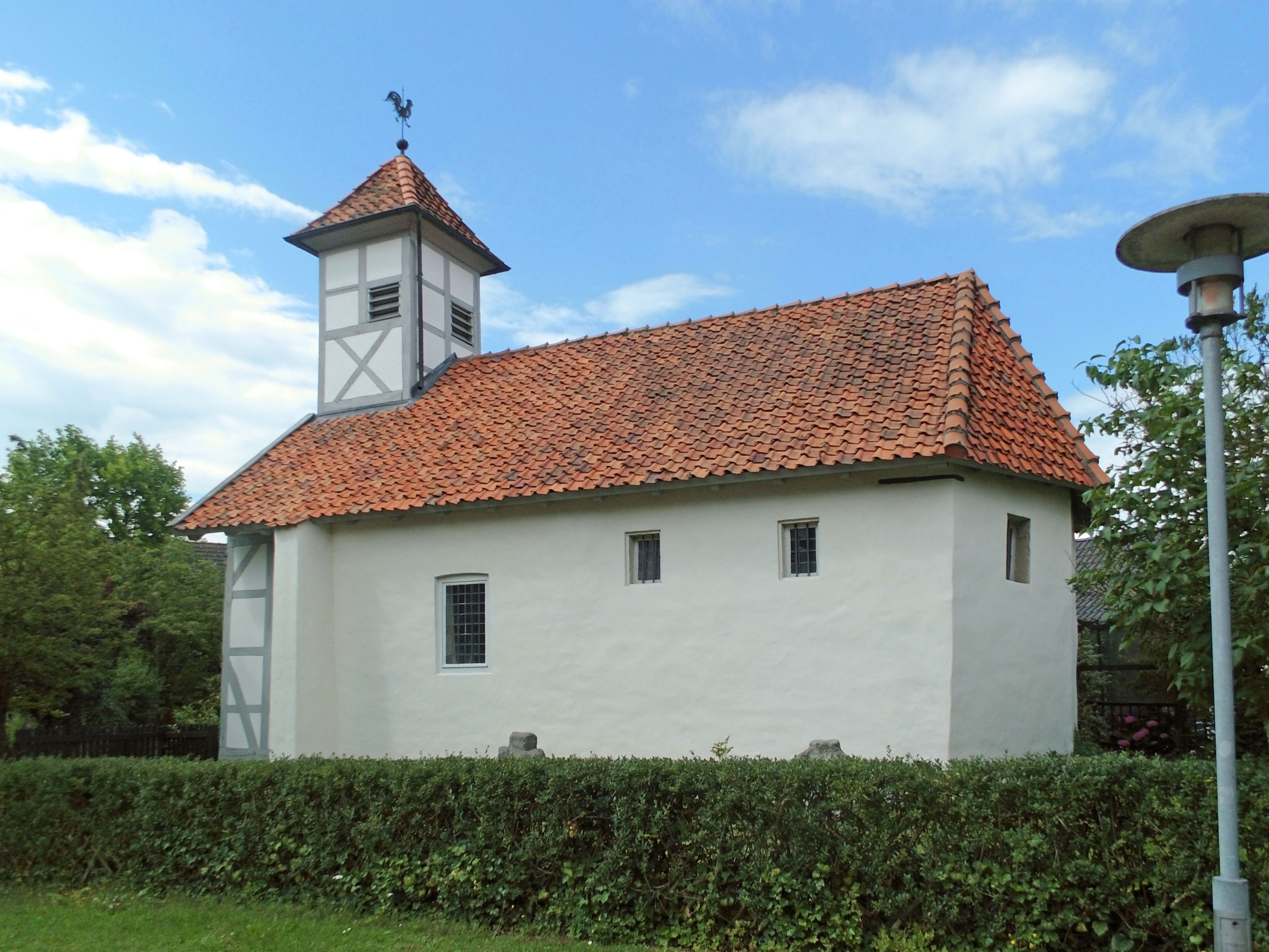 Ev.-luth. Kapelle in Calberlah